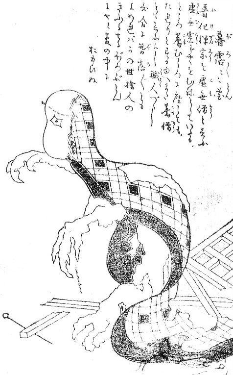 Boroboroton (暮露暮露団) from the Gazu Hyakki Tsurezure Bukuro (百器徒然袋)